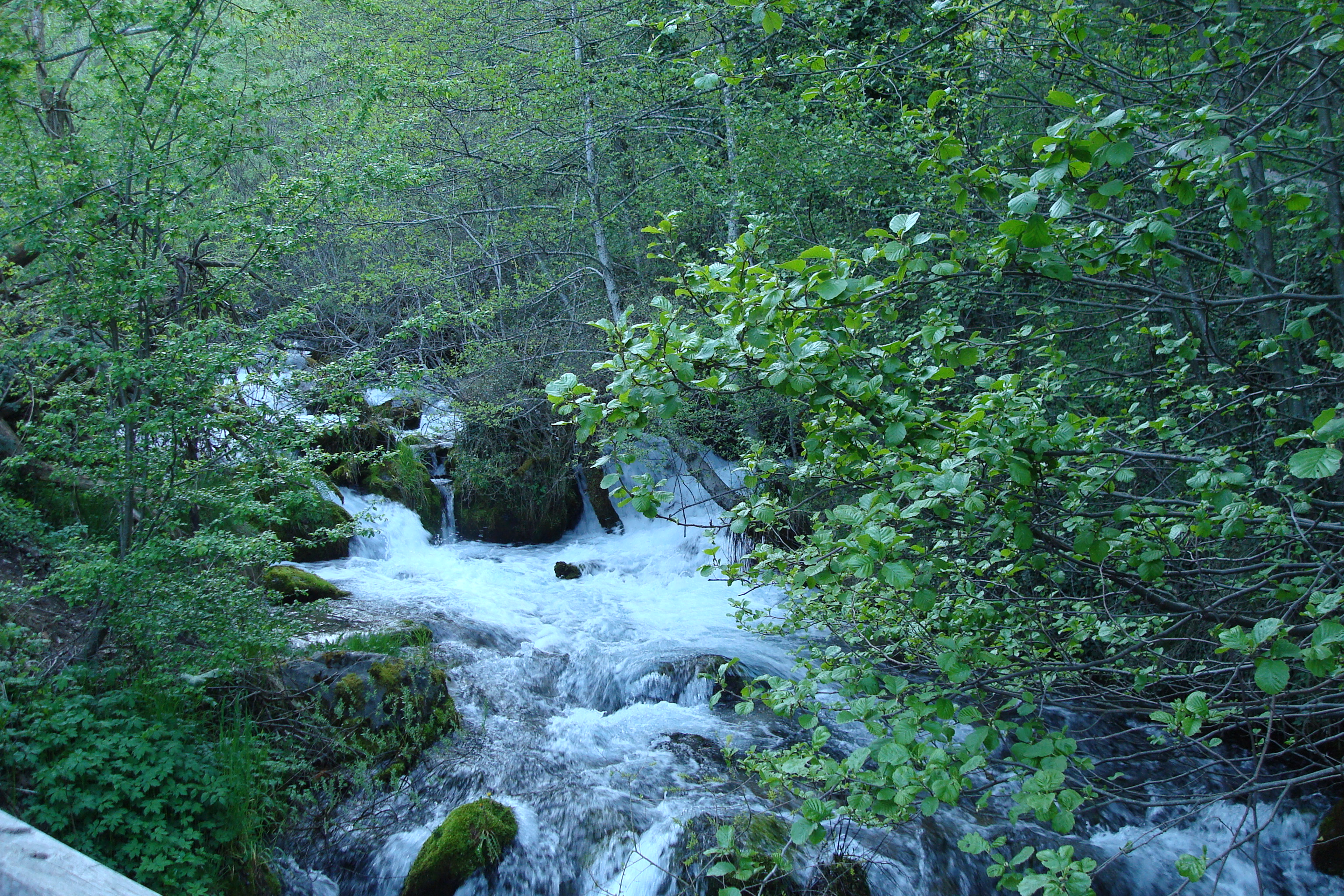 Вевчански извори, Вевчани, Македонија.